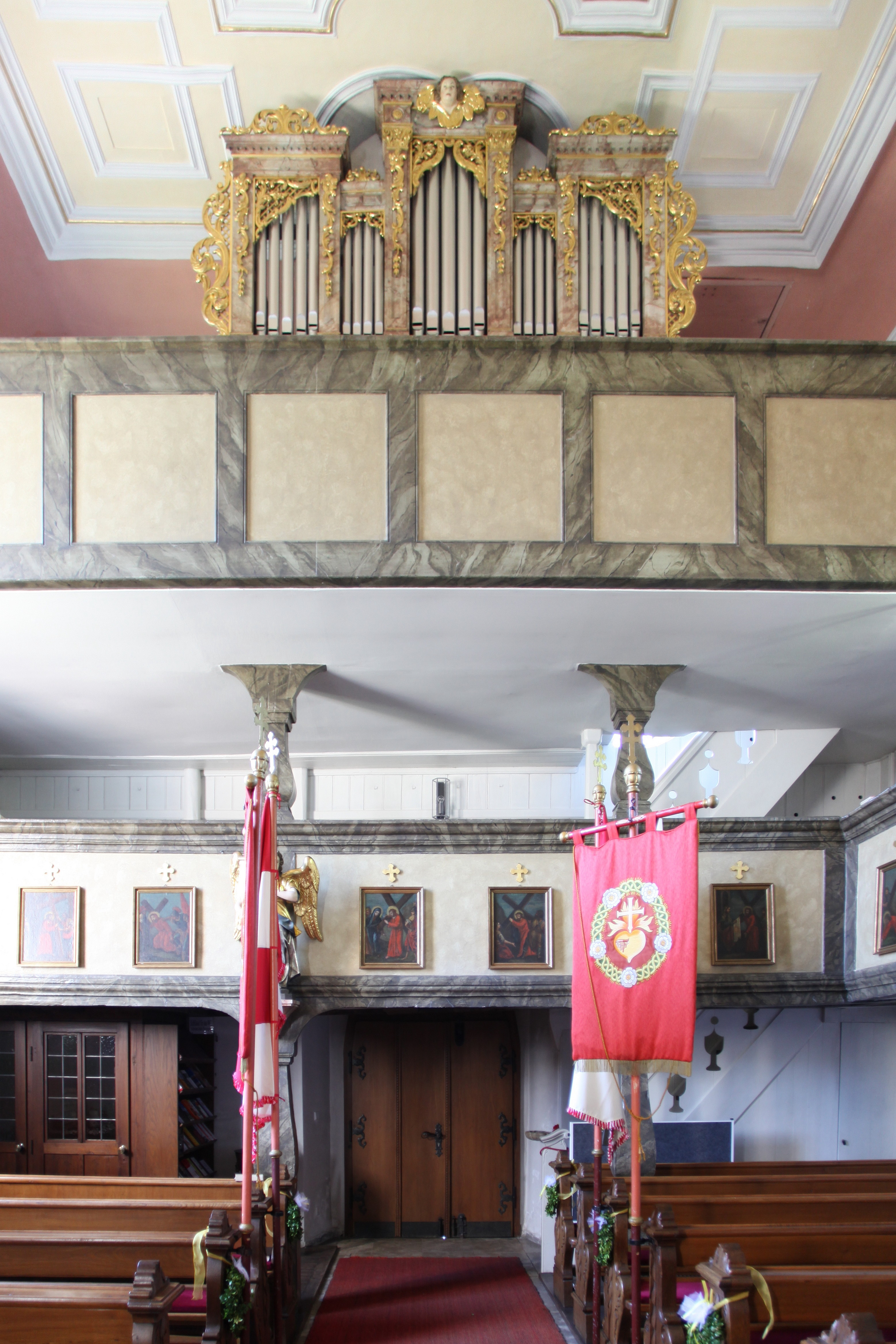 Pfarrkirche Mariä Geburt in Neundorf bei Weitramsdorf, Landkreis Coburg